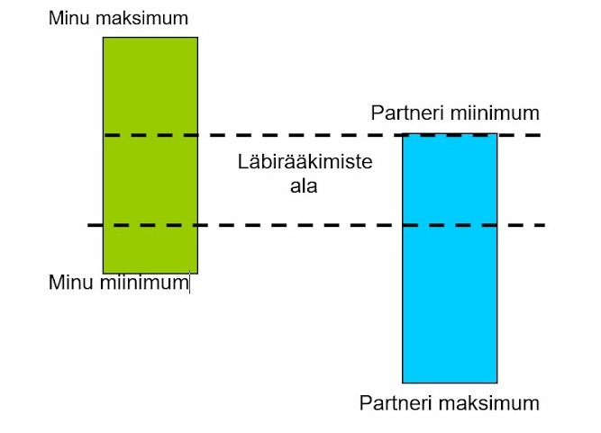 Miinimum- ja maksimumhinnad ja ühisosa läbirääkimistel